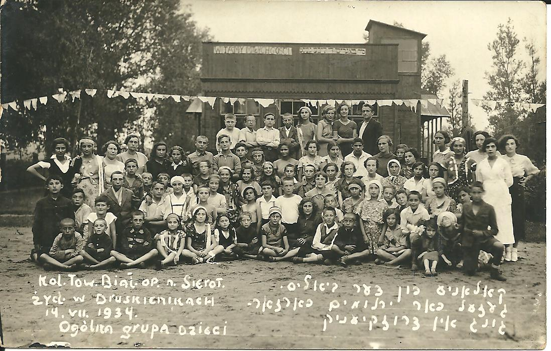 בית היתומים היהודי בביאליסטוק